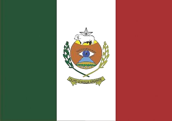 Bandeira da cidade de Olho d'Água Grande, usado em sua página na wikipédia.